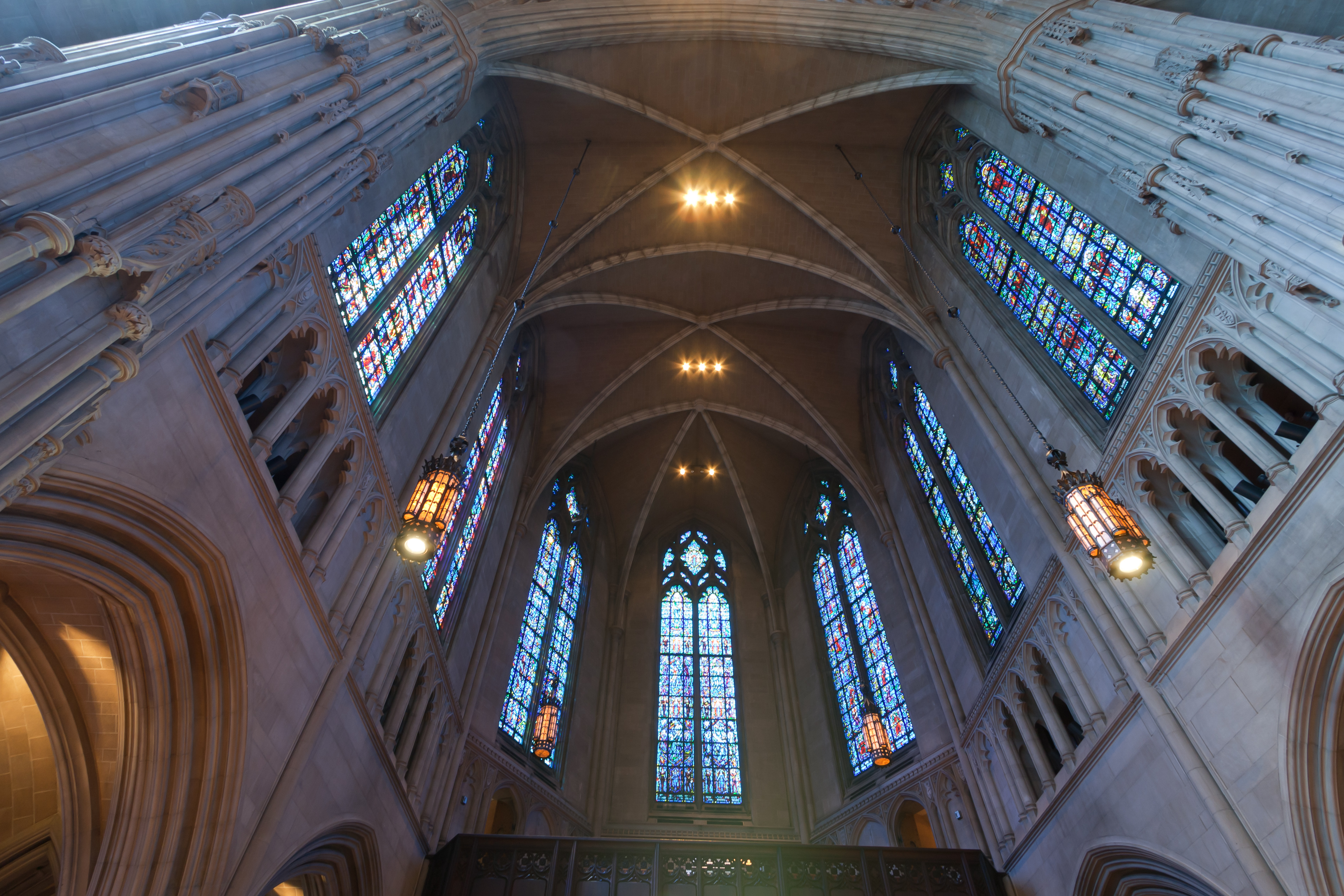 Inside Heinz Chapel